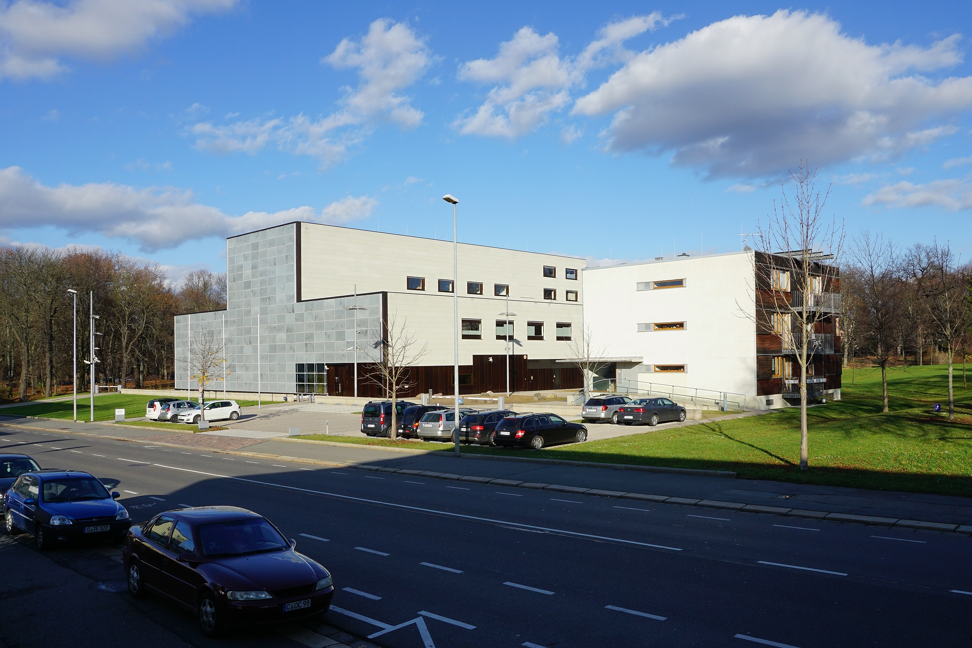 Das Bürohaus und das Wohnhaus der Deutschen Bundesbank - Filiale Chemnitz an der Zschopauer Straße, 2015